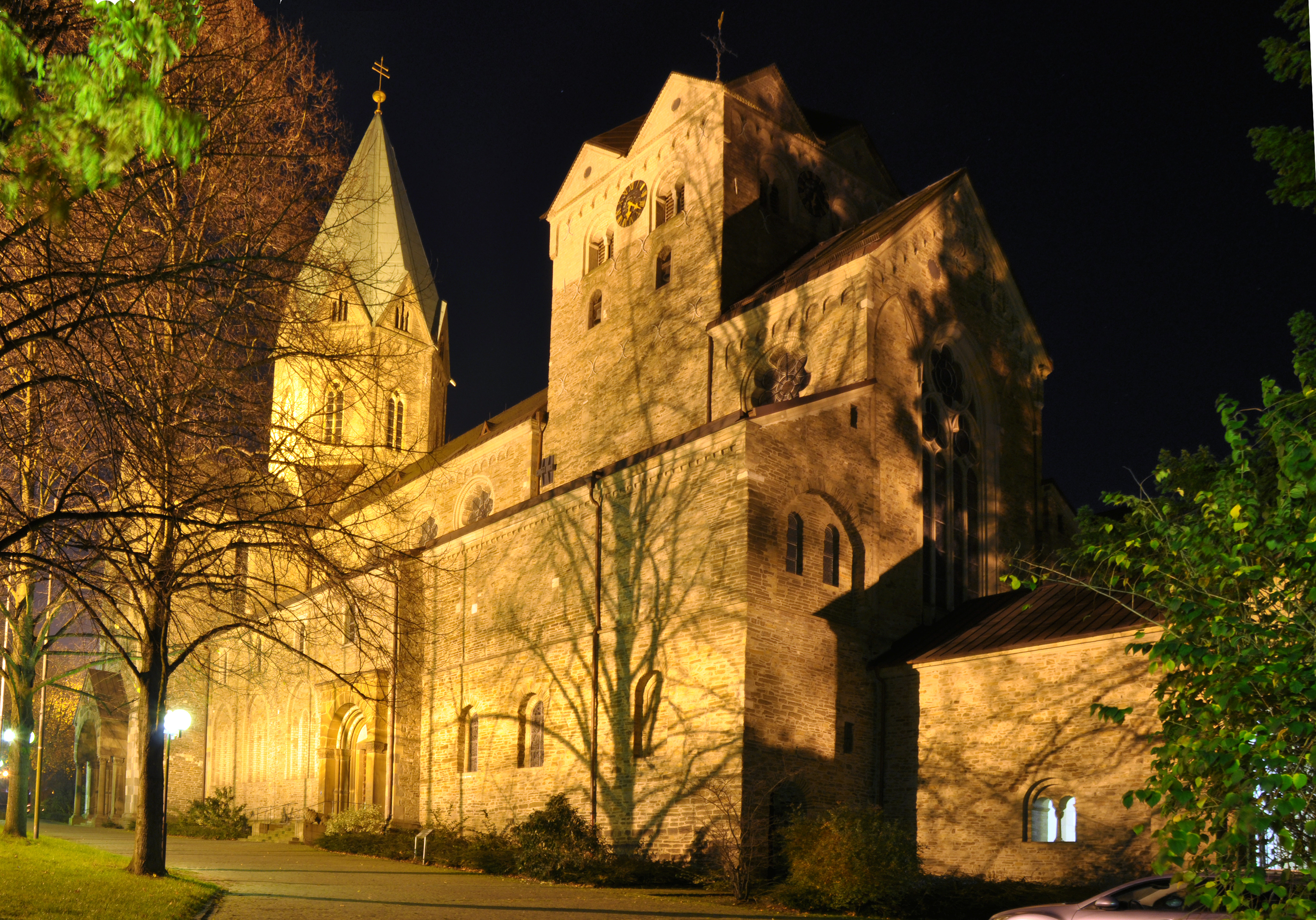 Exterior of St. Ludgerus (Werden) Abteikirche in Essen-Werden, Ludgerus-Kirche